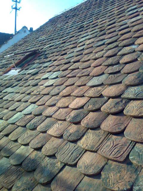 Handgestrichene Dachziegel der Form Biberschwanz auf dem Weberhäusl in Pfaffenhofen. Zweitverwendung von einem abgerissenen Bauernhaus aus Baar.